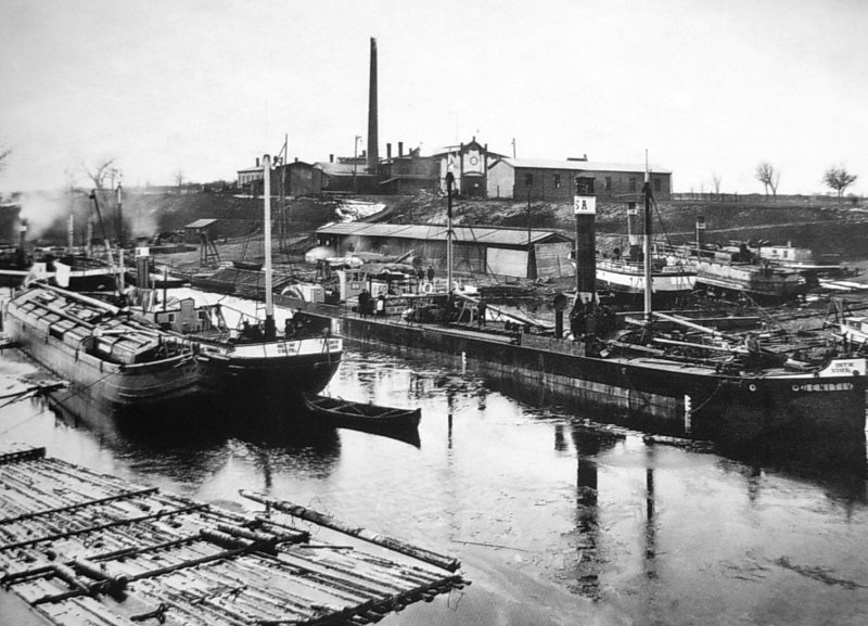 Stocznia Bydgoskiego Towarzystwa Żeglugi Holownicznej na Kapuściskach Małych